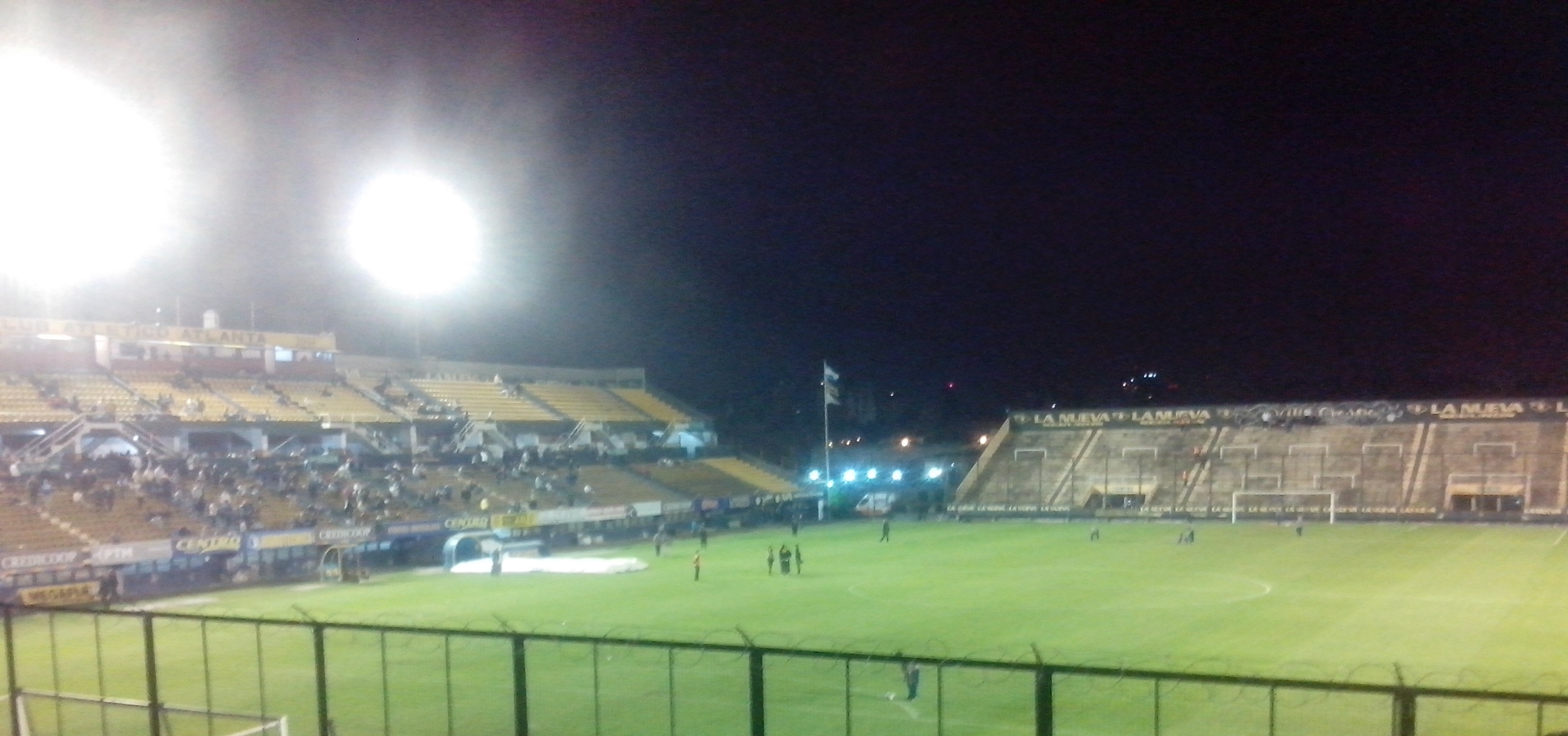 Cancha de Atlanta. Estadio Don Leon kolbowski